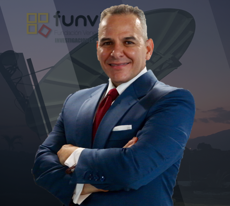 El actual presidente de Funvisis es doctor en políticas de ingeniería, ciencia y tecnología, egresado de la Universidad de Manchester, del departamento Policy Research in Engineering, Science and Technology (Prest) adscrito al Manchester Business School (MBS).